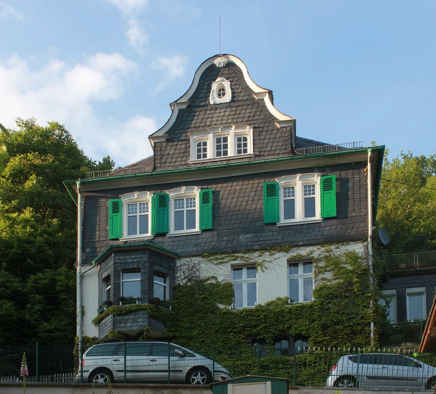 Lehmkuhle 12, Solingen, im Sommer 2015